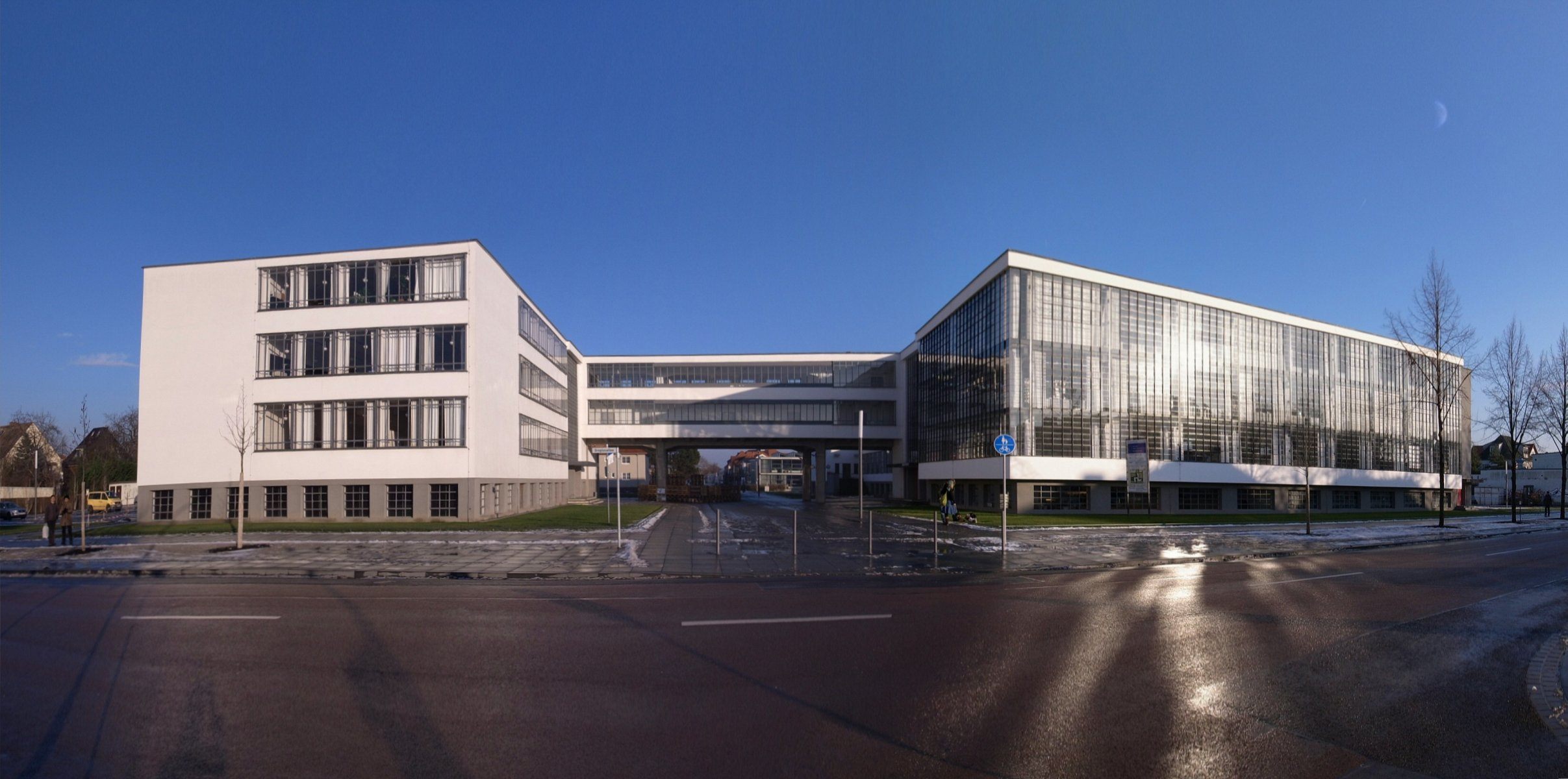 Bauhaus Dessau, Ansicht von der Gropiusallee